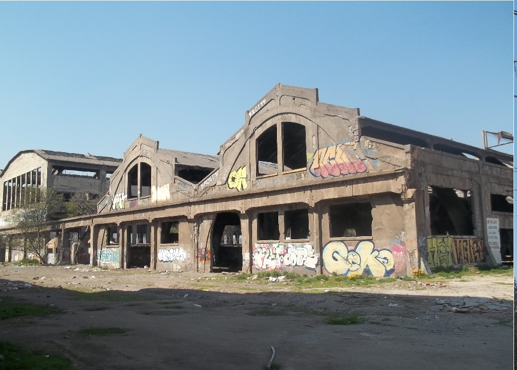 estado actual de los antiguos galpones de la maestranza de san bernardo